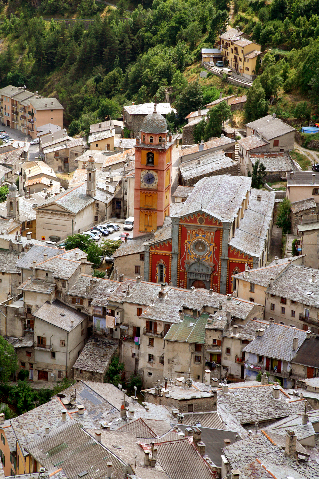 Франция. Департамент Приморские Альпы. Тенд. Старый город